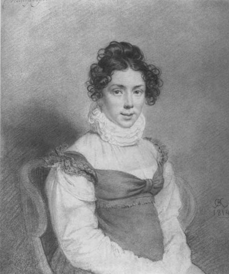 Гурко Варвара Дмитриевна (урожд. Полторацкая) (1793-1838), двоюродная сестра А.П.Керн.